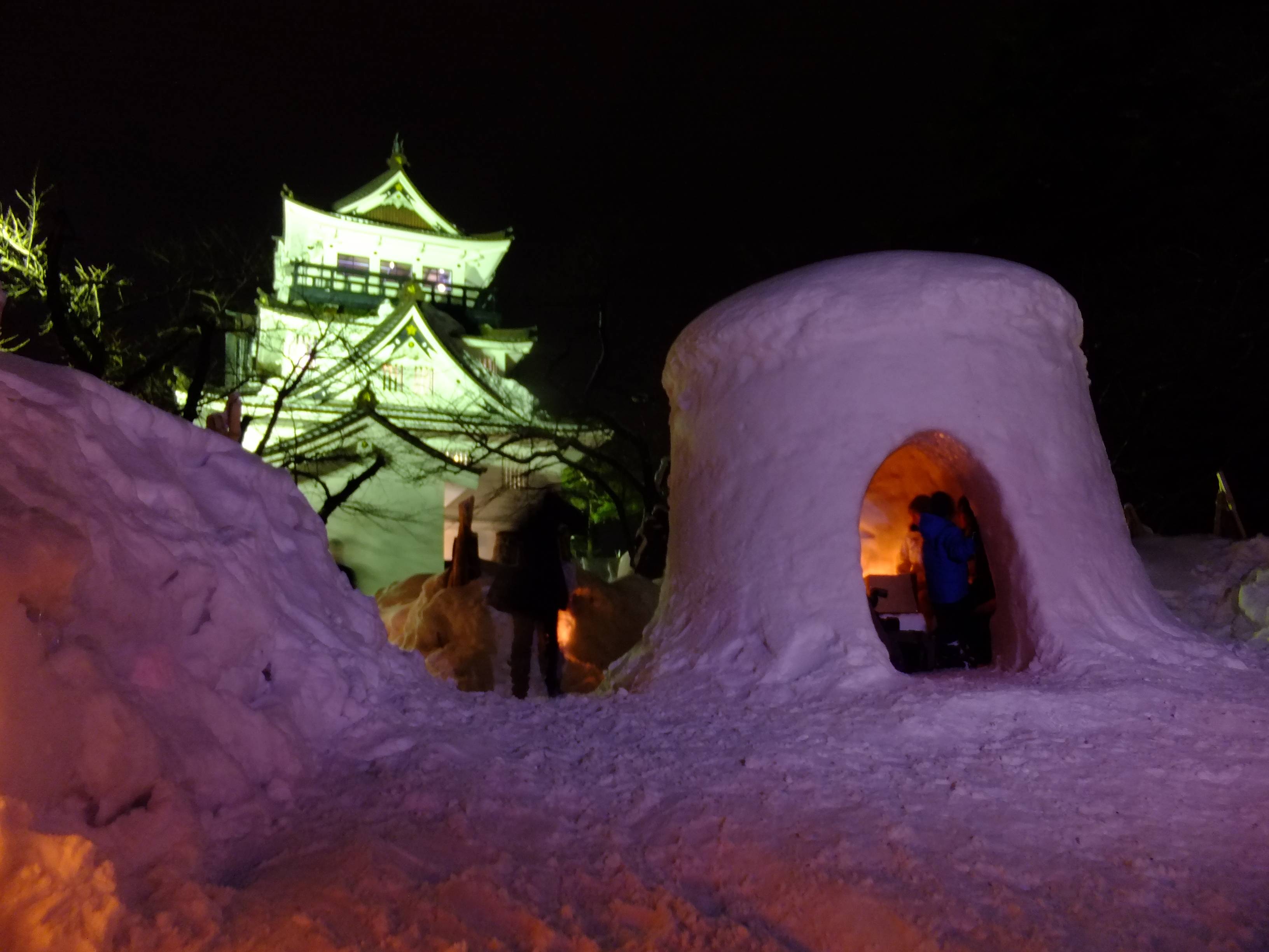 横手かまくら祭り（秋田県横手市）。横手公園展望台前にて